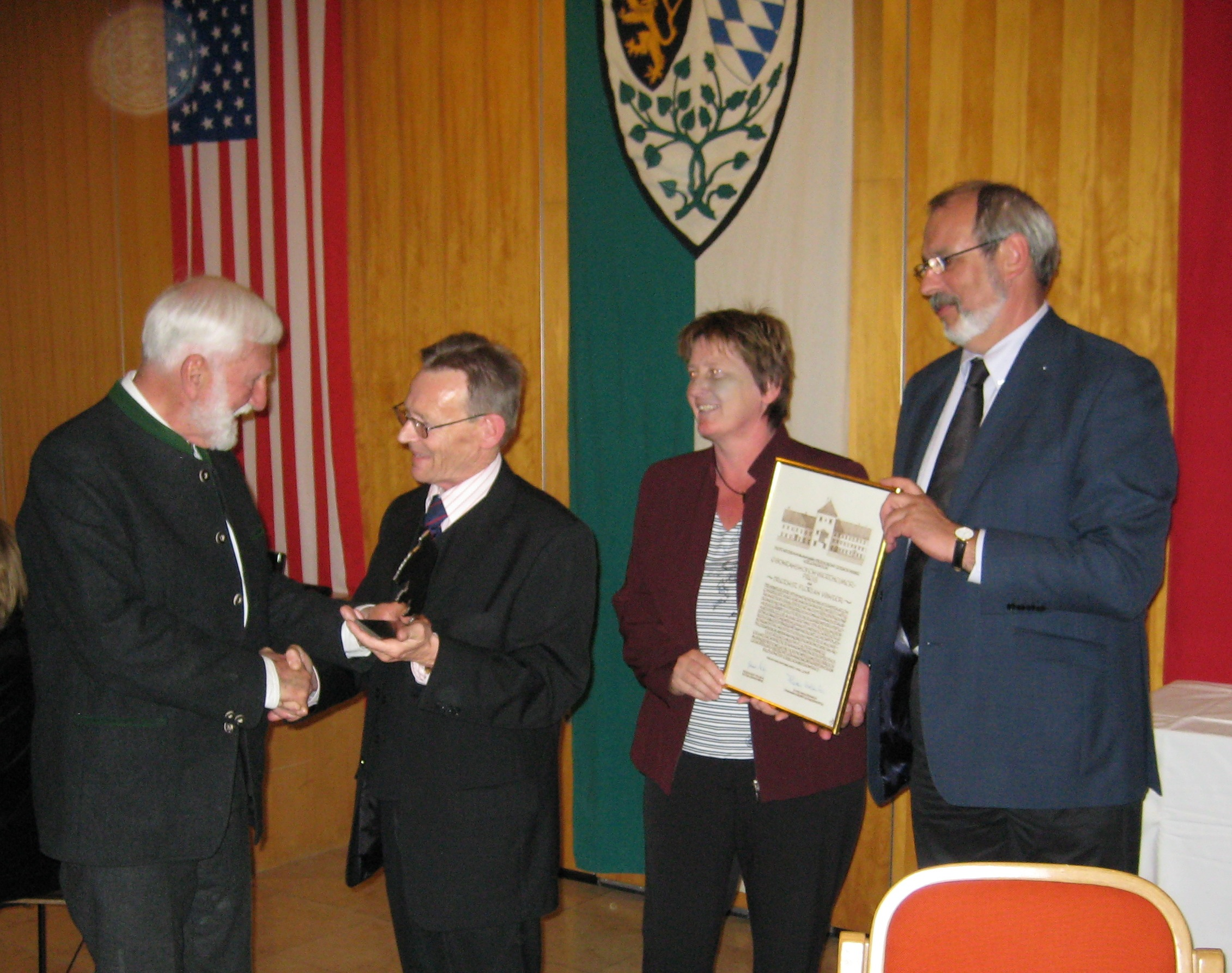 Braunau am Inn ehrte Ernst Florian Winter mit dem Egon Ranshofen-Wertheimer Preis. von links nach rechts: Prof. Dr. Ernst Florian Winter Bgm. Gerhard Skiba (Braunau am Inn) Vzbgm. Ingrid Neulinger (Braunau am Inn) Mag. Florian Kotanko (Verein für Zeitgeschichte)